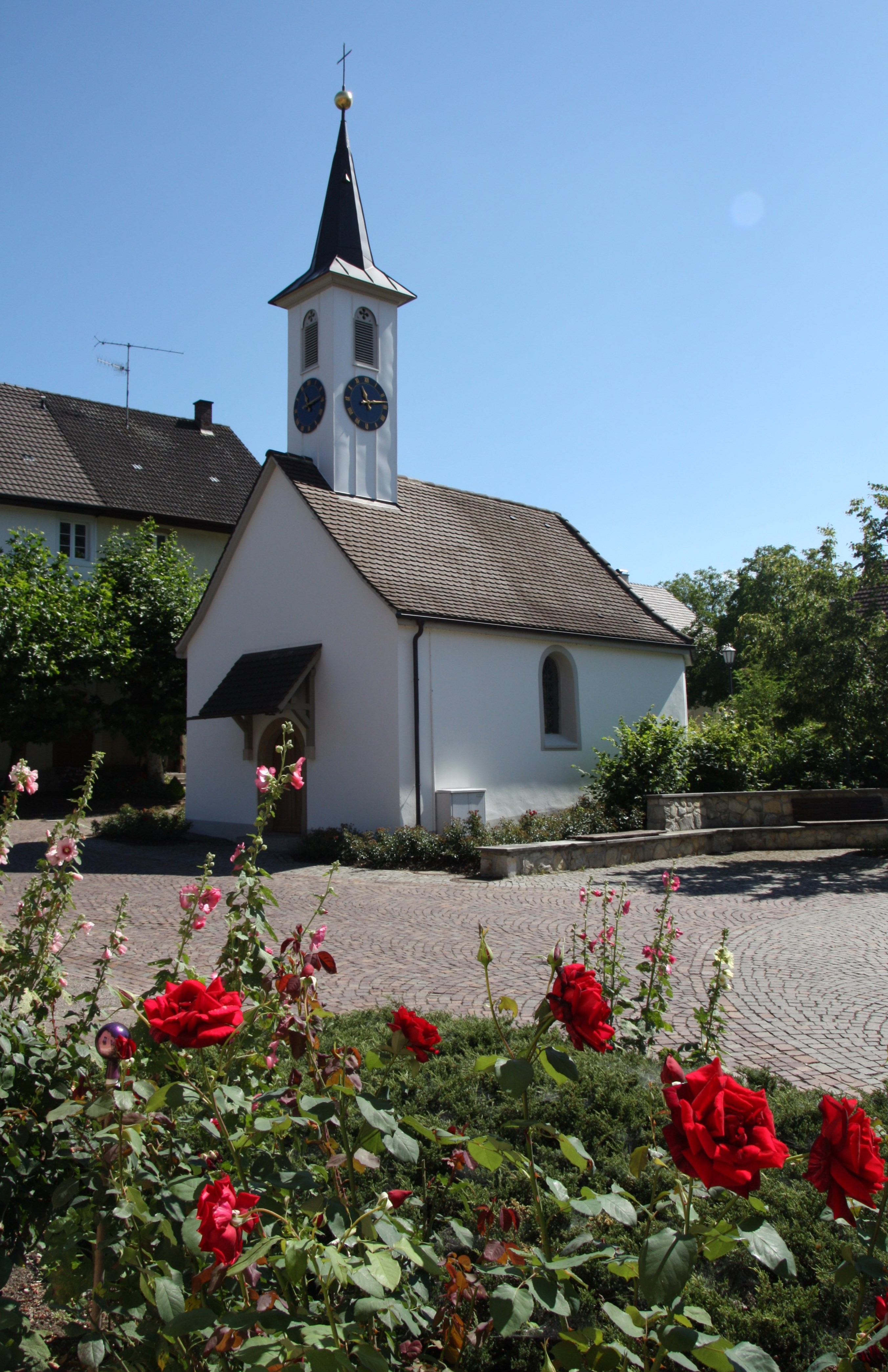 Ortschaft Reckingen, Ortsteil der Gemeinde Küssaberg im Landkreis Waldshut in Baden-Württemberg. Die im Jahr 1795 erbaute St. Josefskapelle (Ortsmitte).